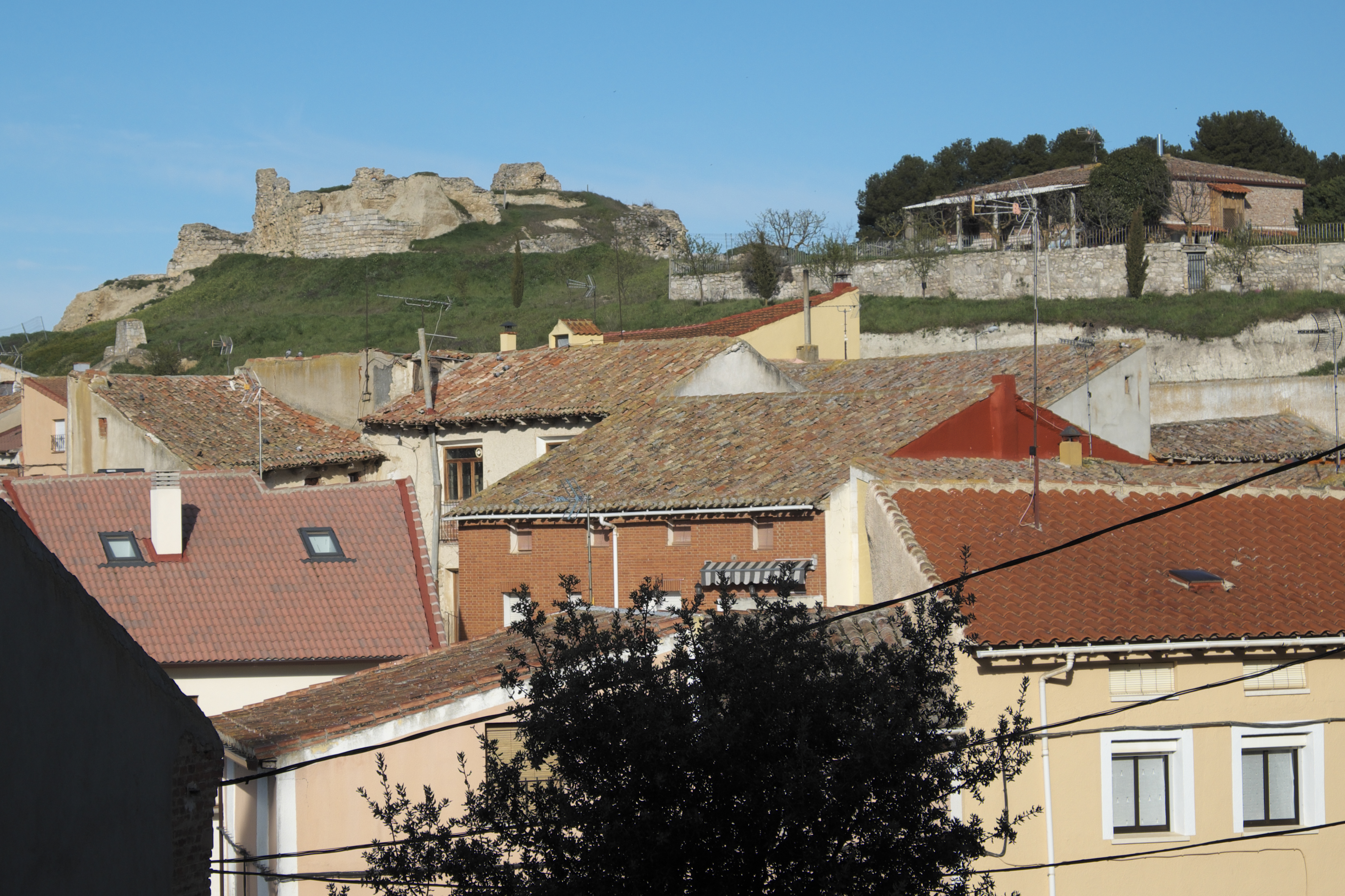 Burgruine, Castillo de Mucientes, in Mucientes in der Provinz Valladolid (Kastilien-León/Spanien)